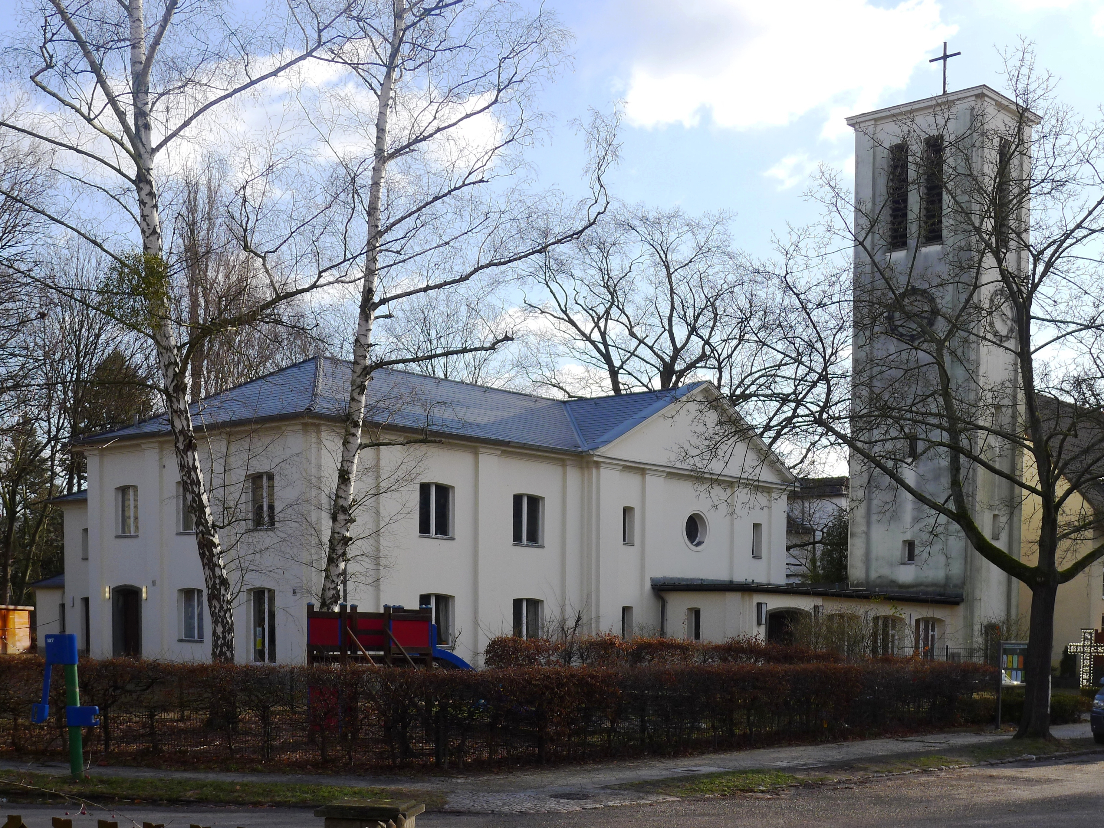 Eingangsfront der Kirche mit Campanile